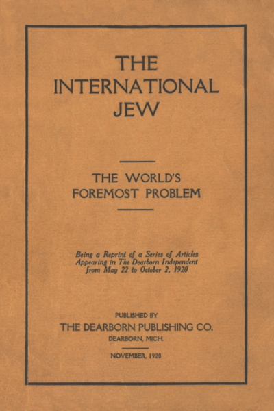 The International Jew, Nov. 1920 - 1st Edition by Henry Ford